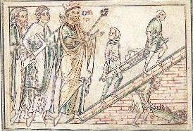 Description : Brouette représentée dans "Life of Saint Alban" du moine bénédictin Matthew Paris Statut